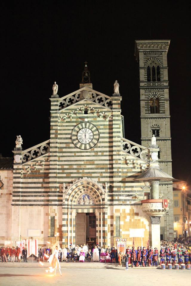 Piazza Duomo This is a photo of a monument which is part of cultural heritage of Italy.